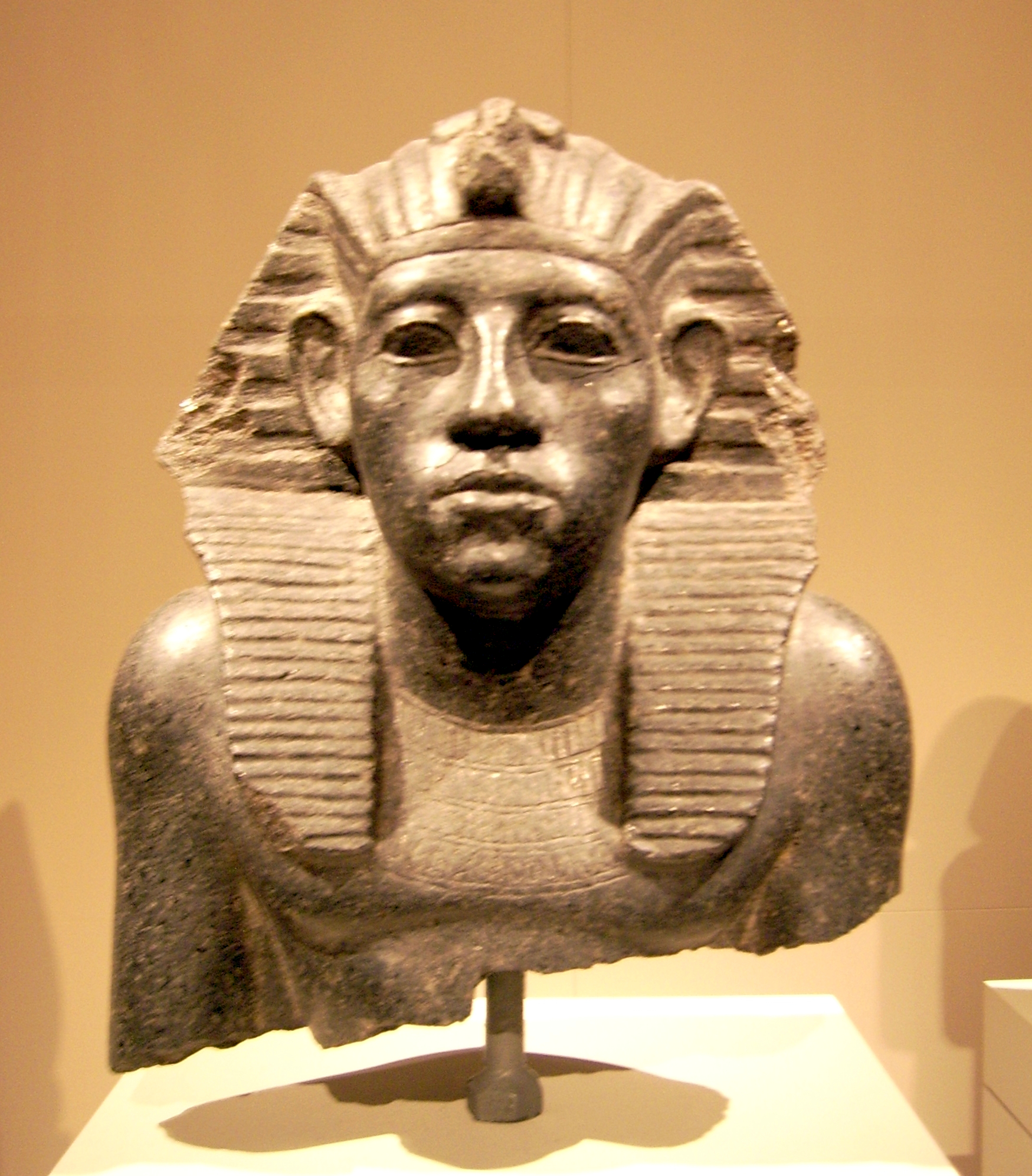 Kopf einer Statue Amenemhets III. mit Nemes-Kopftuch; Mittleres Reich, 12. Dynastie, um 1950 v. Chr.; Granit; Ägyptisches Museum Berlin/Altes Museum